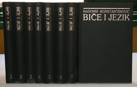 Радомир Константиновић - "Биће и језик" у осам томова